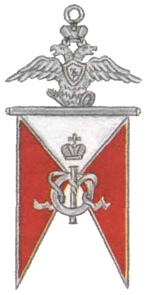 Badge of Kavalergardsky Regiment